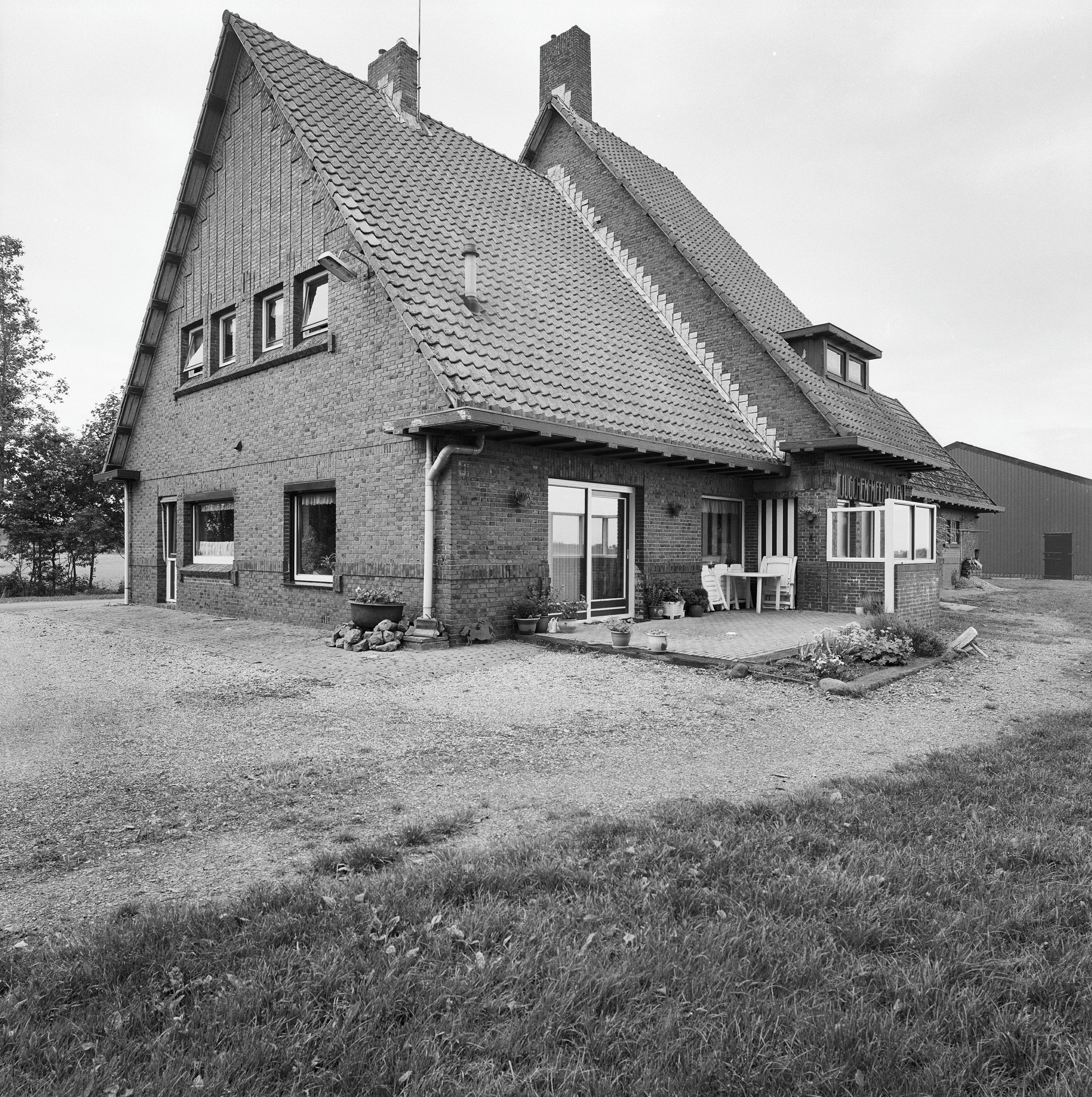 Voormalig stationTjuchem-Meedhuizen: Overzicht achtergevel aan de vroegere spoorzijde en rechter zijgevel (opmerking: Gefotografeerd voor Monumenten In Nederland Groningen)